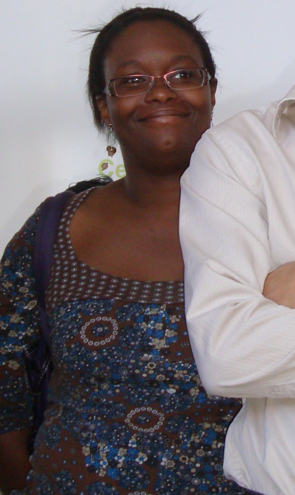 Mathieu Hanotin et Sibeth N'Diaye (conseillère en communisation de Claude Bartolone) au stand du Conseil général de la Seine-Saint-Denis lors de la Fête de l'Humanité 2009